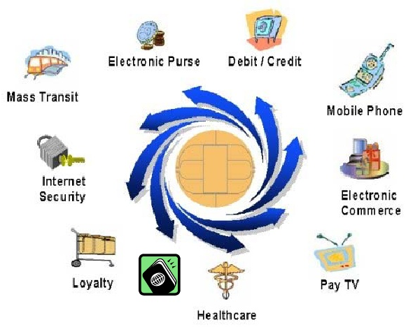 Les marchés des cartes à puce